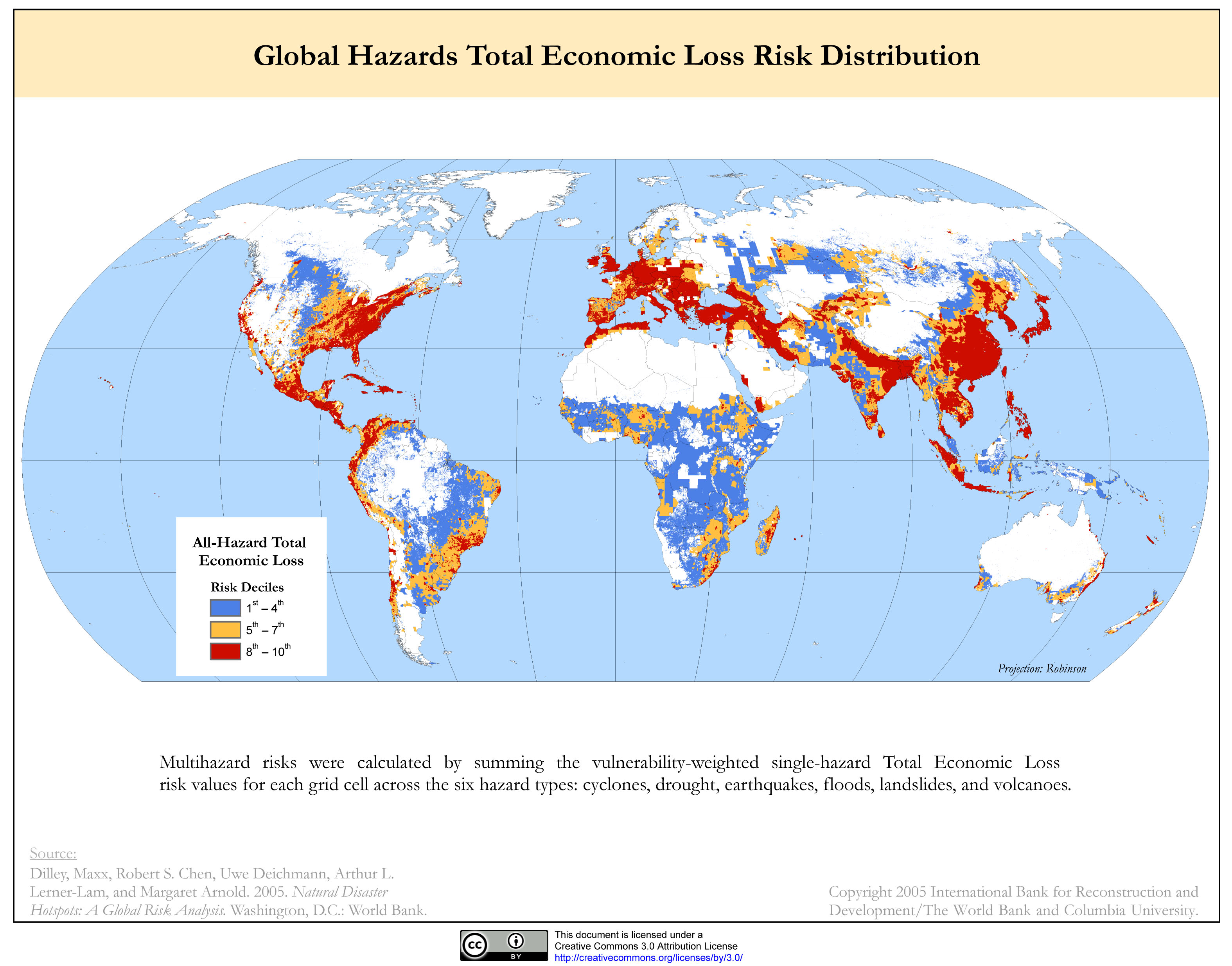 Global Multihazard Total Economic Loss Risk Deciles